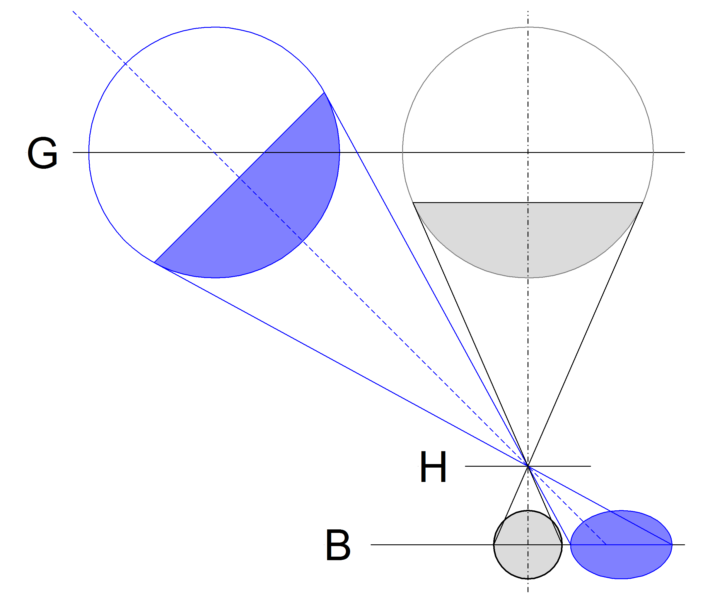 Verzerrung bei der optischen Abbildung kugelförmiger Objekte abseits der optischen Achse.